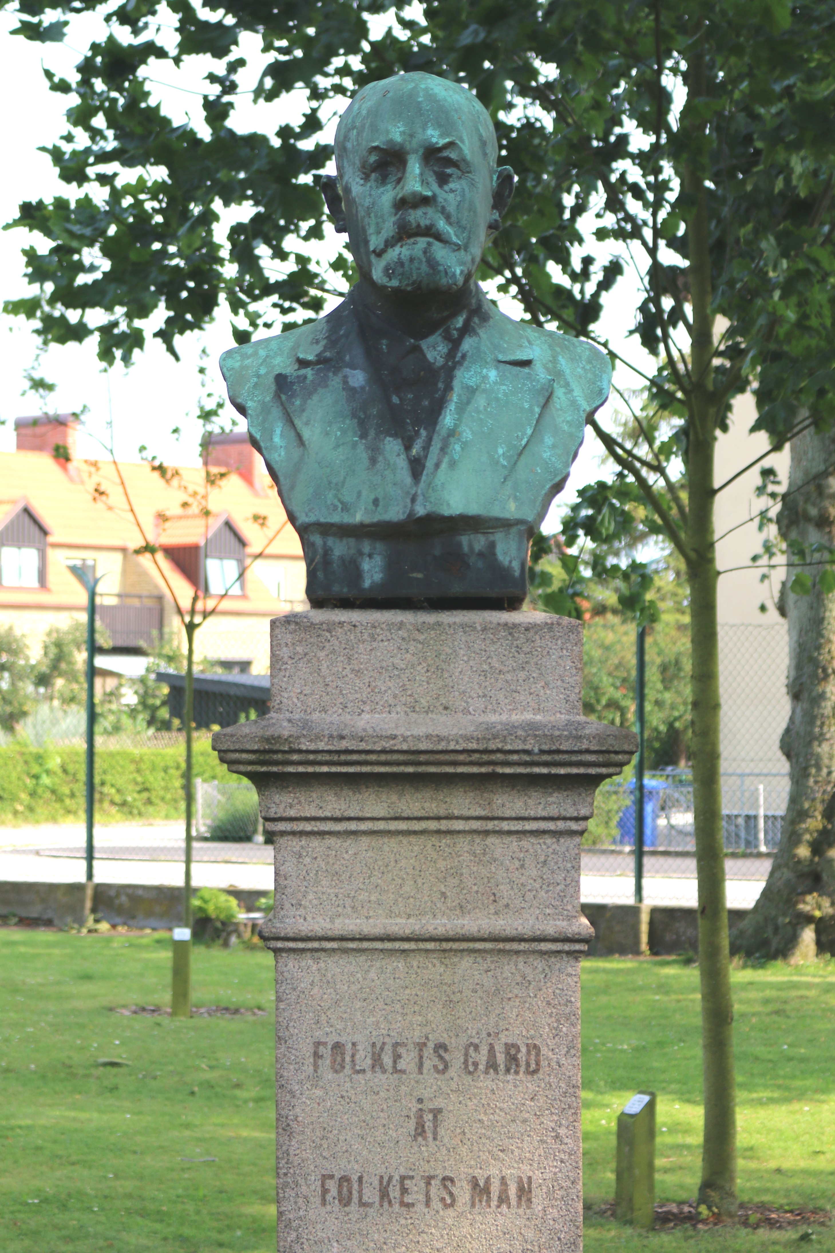 Byst av F.V. Thorsson av Sven Andersson, konstverk i Ystad